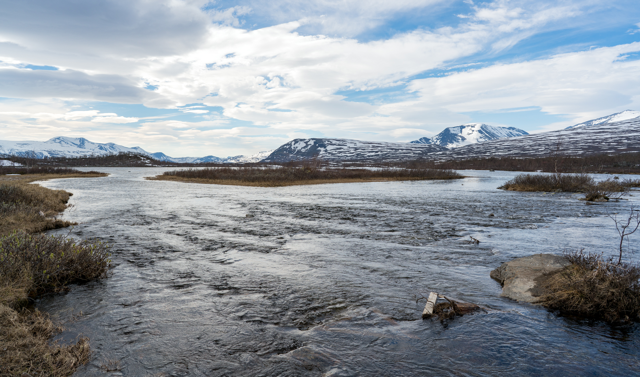 Boarekjåhkås inlopp i Boarekjávrre.